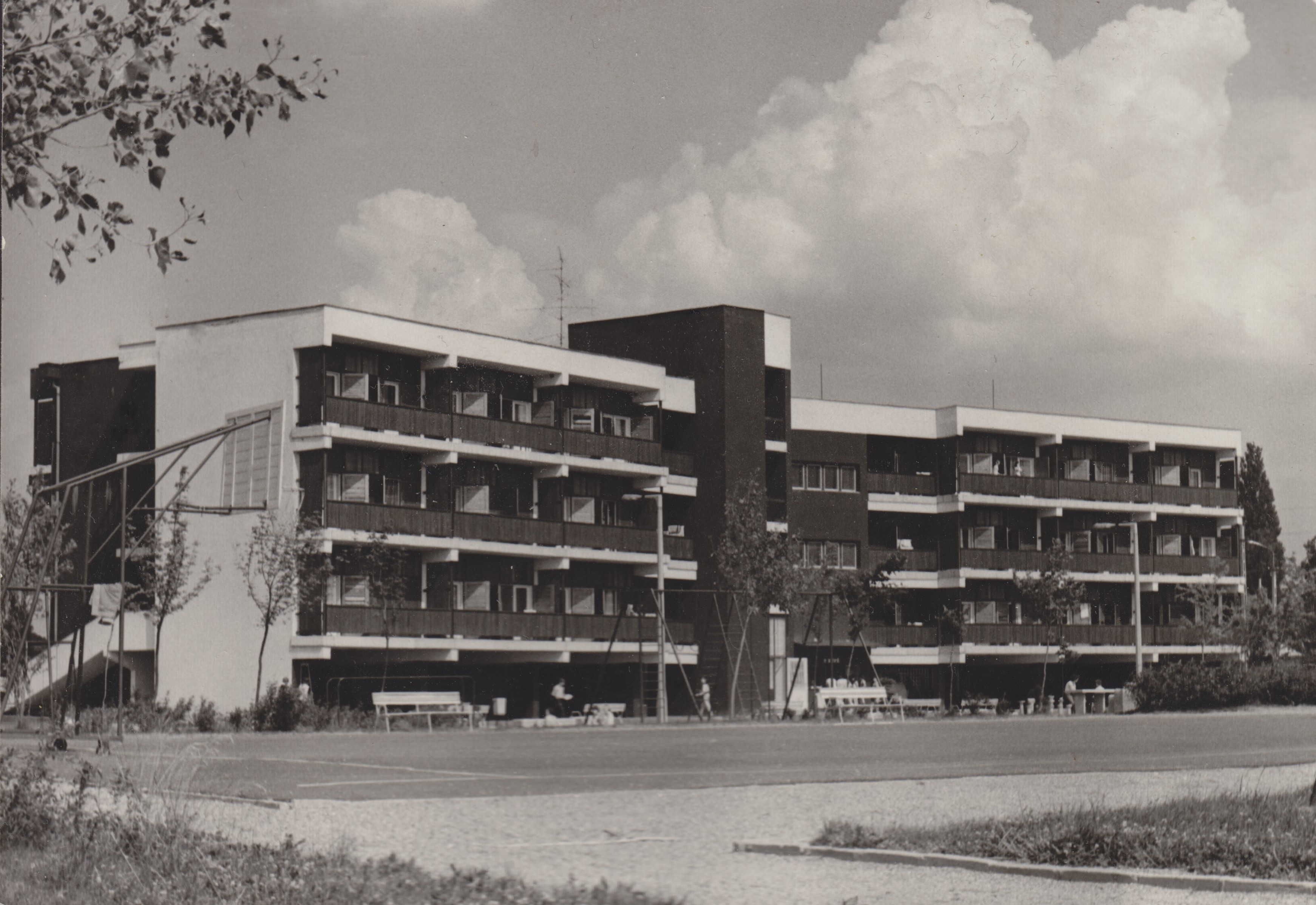 A balatonberényi Vas Megyei Gyermeküdülő, a sportpályák felöli homlokzata.